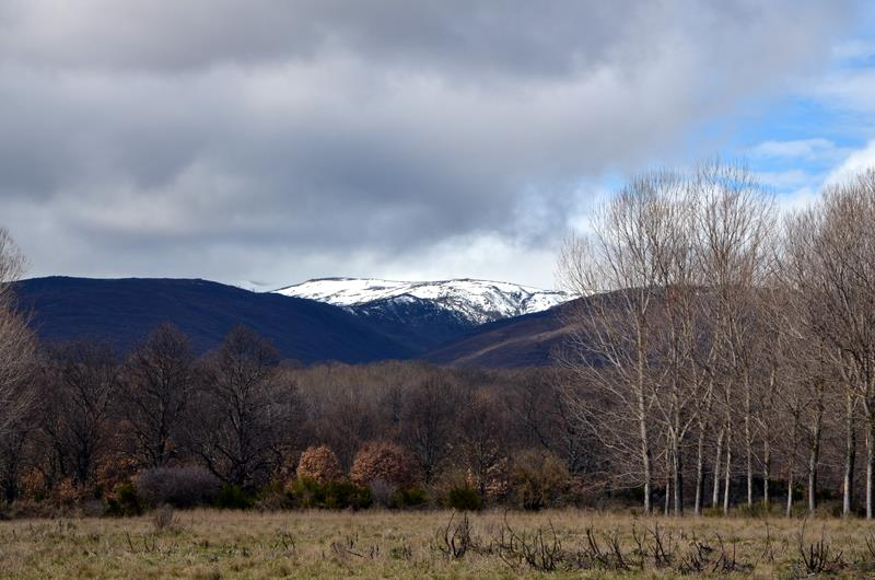 Sanabria (Zamora), Abril 2013